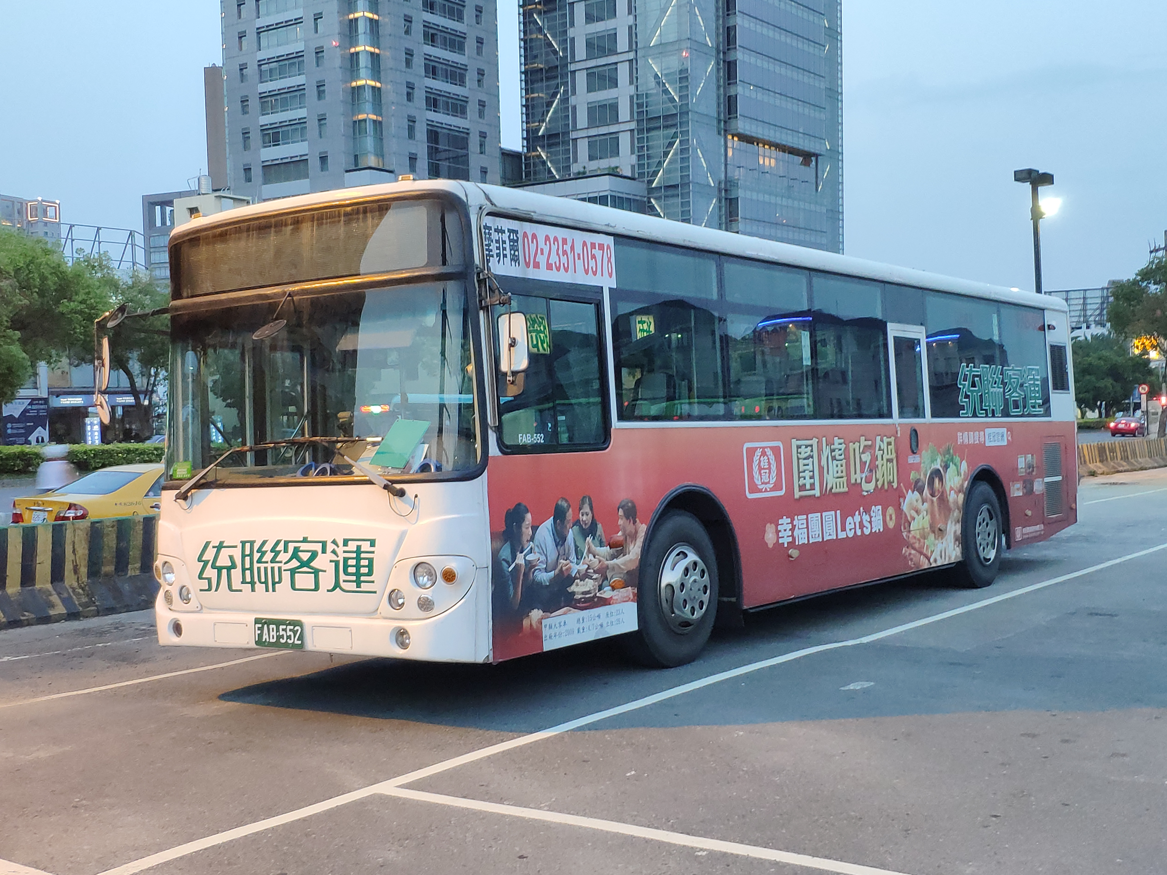 統聯客運大宇BC211M大客車FAB-552